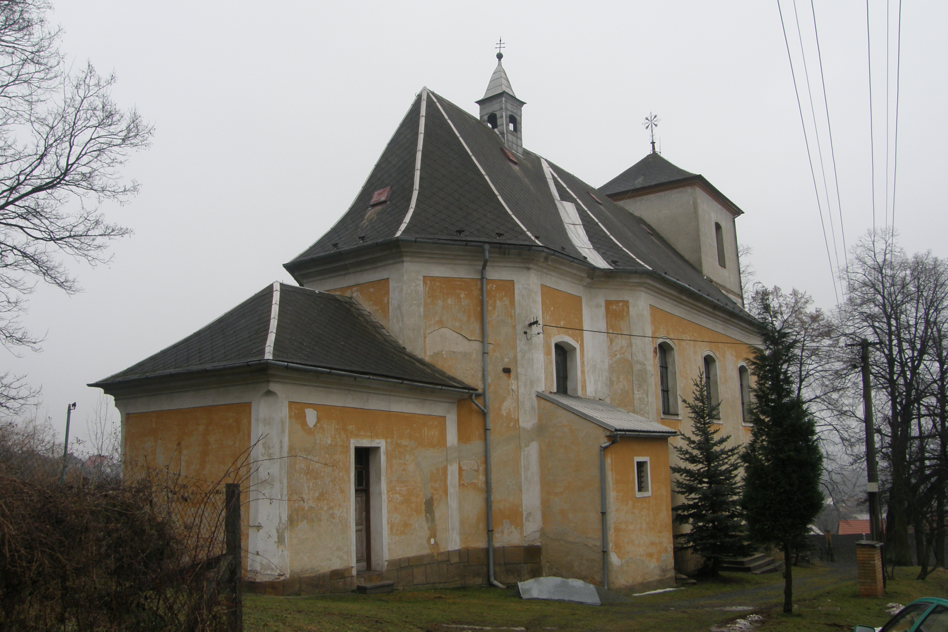 Kostel Povýšení svatého Kříže v Borotíně